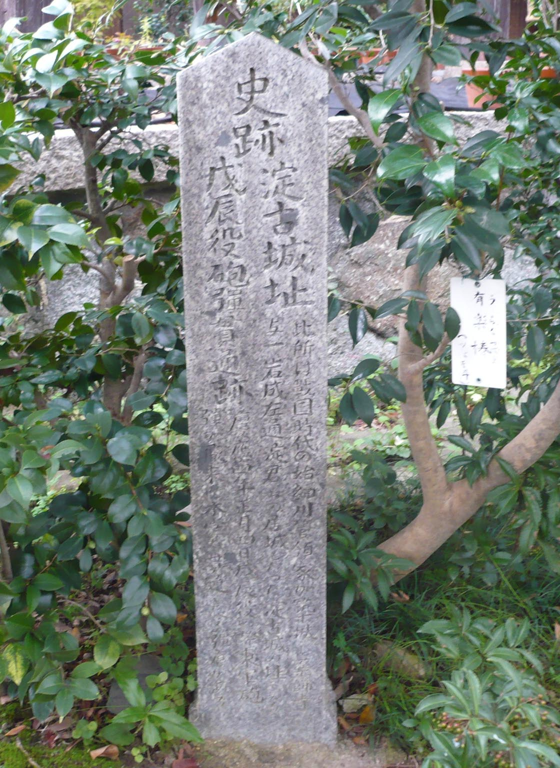 淀古城の石碑